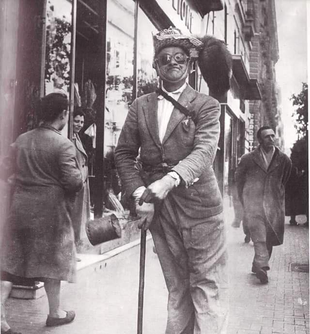 Napoli - Personaggio pittoresco facente parte della scena napoletana: armato di un corno rosso e di un barattolo in cui fuma dell'incenso, toglieva il malocchio o scacciava la malasorte tanto ai negozi quanto alle persone, pronunciando parole o formule di scongiuro (p. es. "Sciò sciò ciucciuè!" oppure "Aglio e fravaglio fattura ca nun cuaglia, corna e bicorna capa alice e capa d'aglio."), chiedendo poi uno spicciolo per il suo servizio. Mentre i negozi non potevano sfuggire al suo breve rito magico (e per non incorrere invece nelle sue maledizioni - che avrebbero attirato ogni sorta di sventura sul luogo - si sentivano obbligati a sborsare un soldo), fra le persone singole, quelle che non volevano dargli lo spicciolo ma neanche incorrere nelle sue maledizioni, prima di incontrarlo badavano bene a cambiare marciapiede; le altre invece, altrettanto superstiziose, ben volentieri si facevano toccare con il corno, sicure che ne sarebbe seguita una benefica liberazione da un qualche maleficio, ed alla sua affermazione "Ti ho toccato: 100 lire!" ben volentieri gli sborsavano la moneta richiesta.